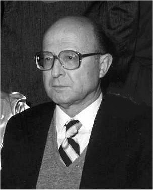 מרדכי אגייב היה מהנדס ישראלי, חתן פרס ביטחון ישראל.